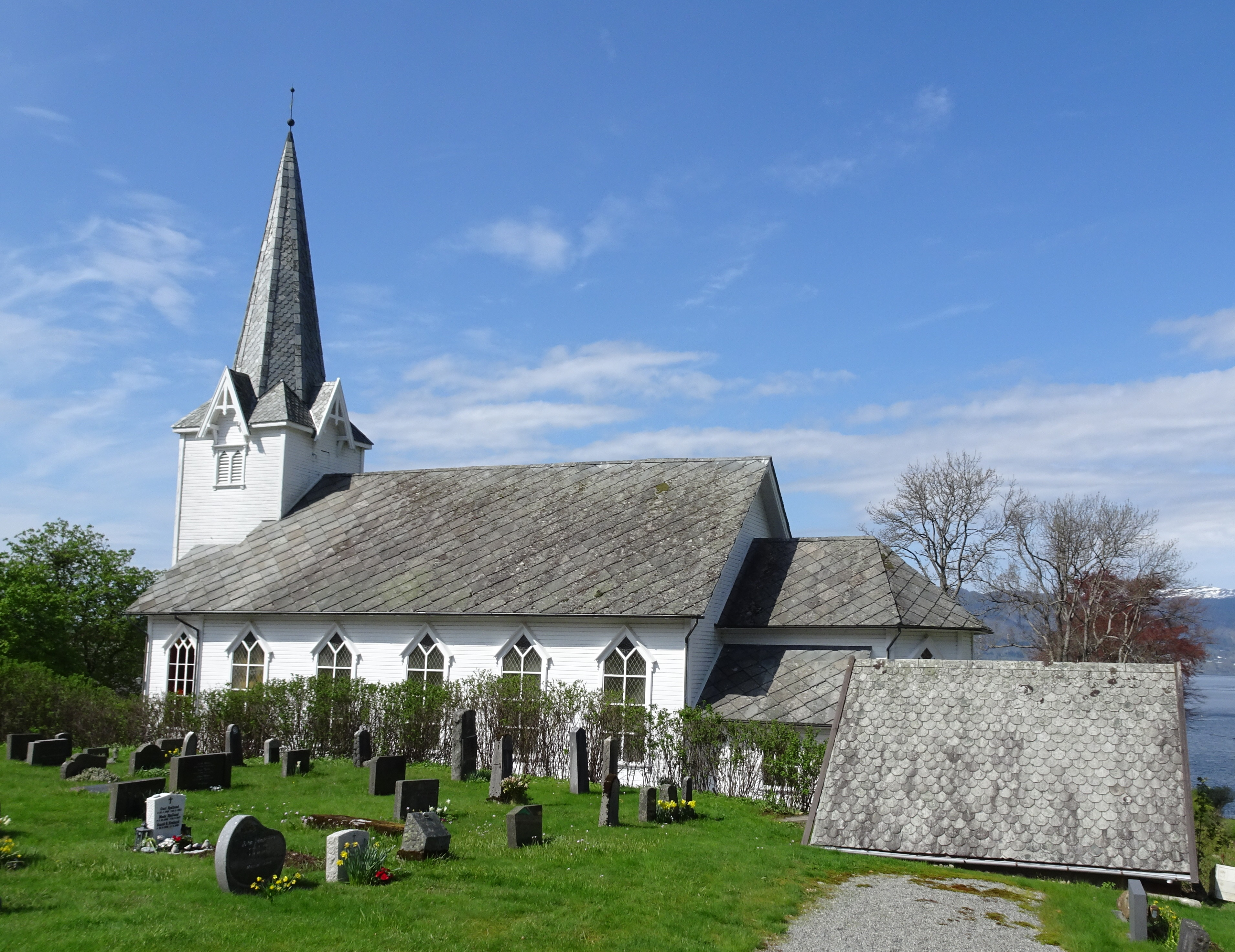 Skånevik kirke, Etne kommune, Hordaland